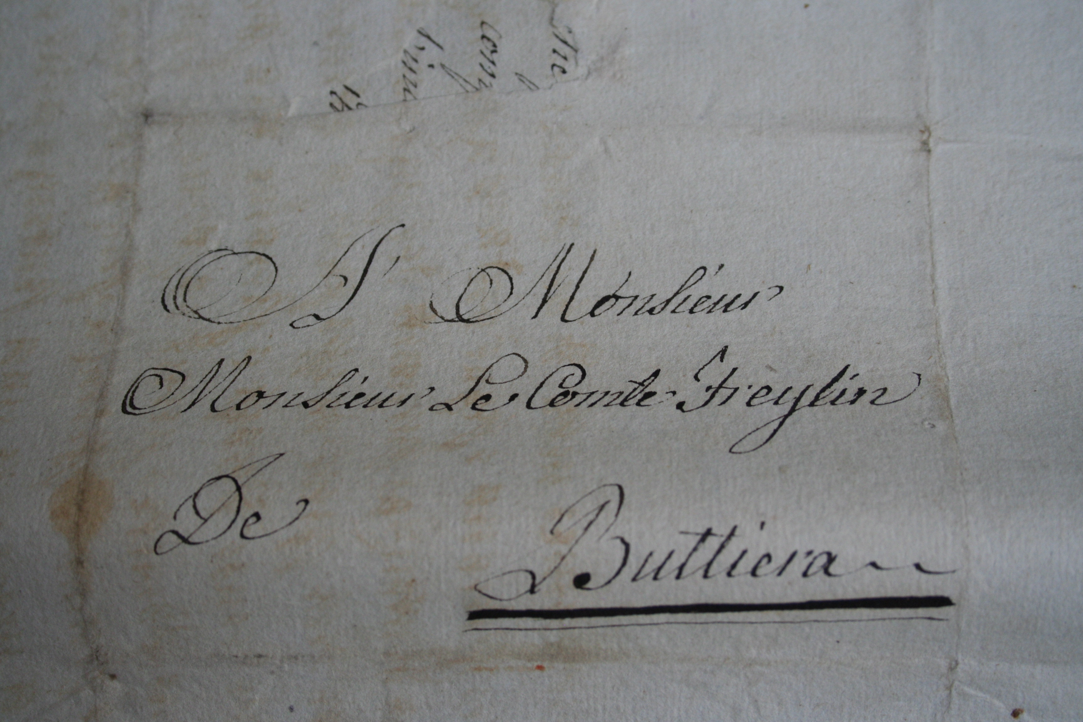 Lettre